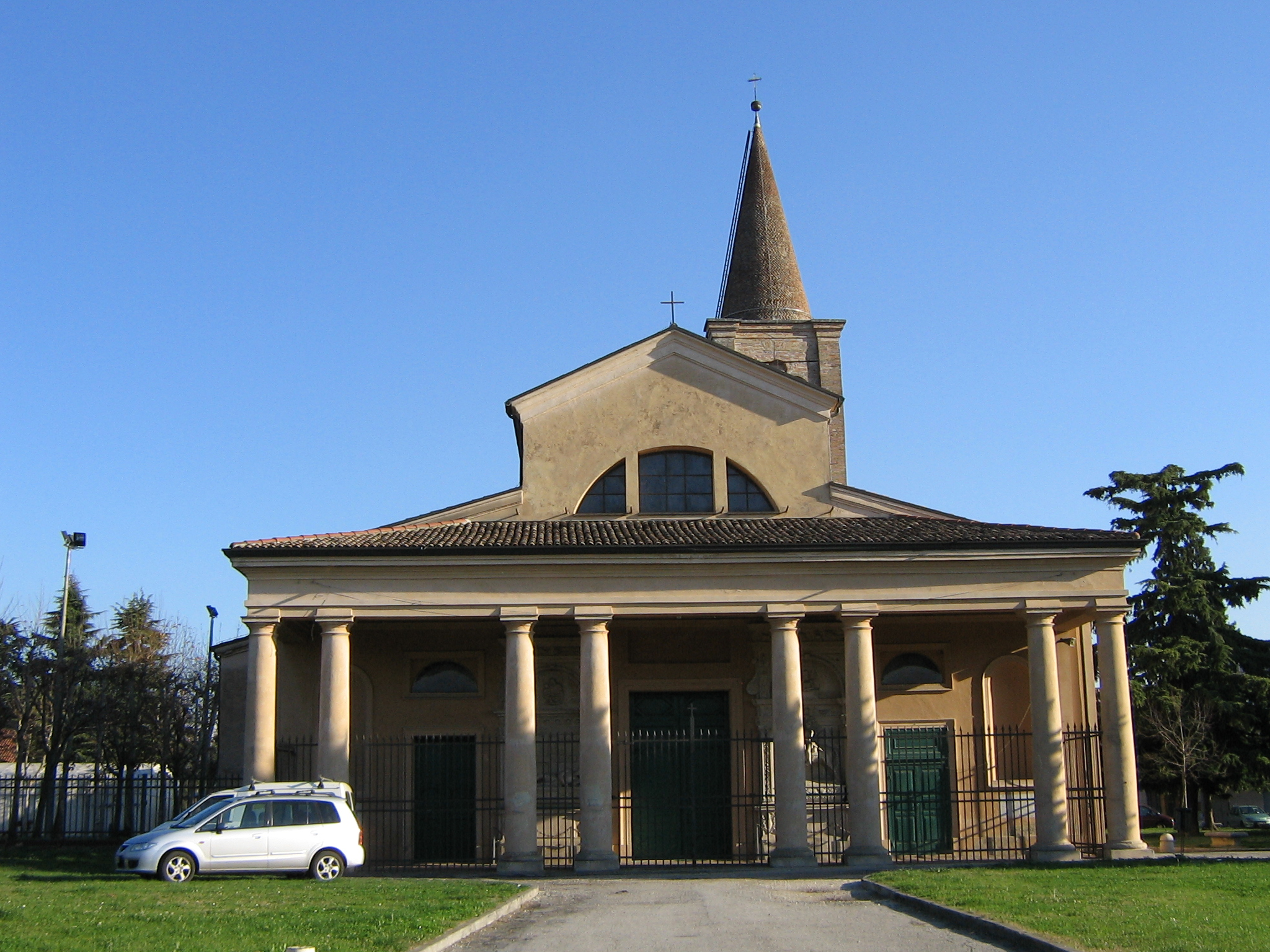 Forlimpopoli: la Basilica minore di San Rufillo.